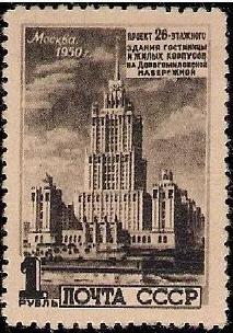 Почтовая марка СССР № 1580. Проект гостиницы Украина